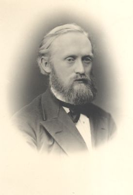 Georg Loeschcke (1853—1915), deutscher klassischer Archäologe